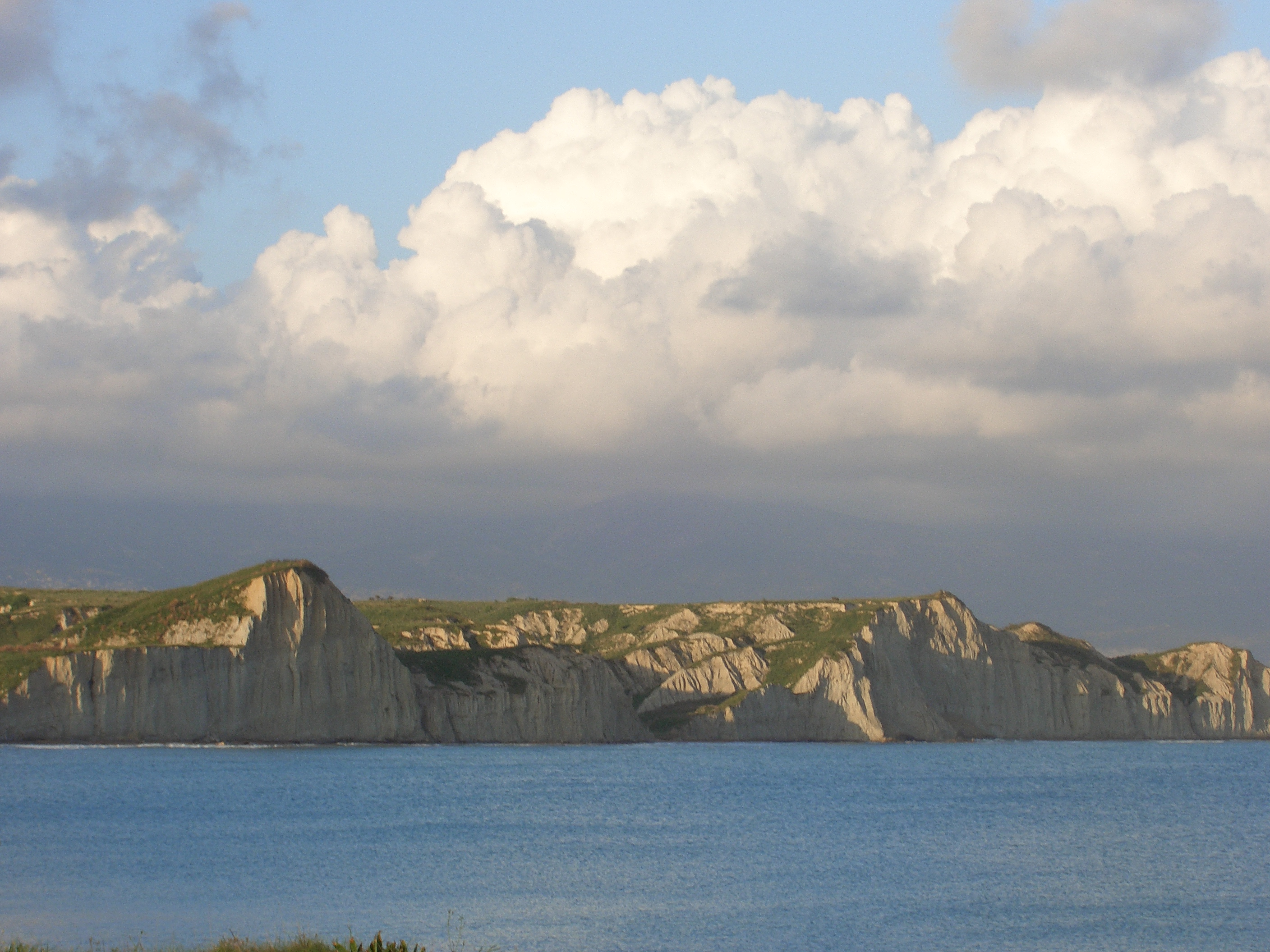 Strand Mania bei Lixouri von Akrotiri aus gesehen, Kephallonia, Griechenland.